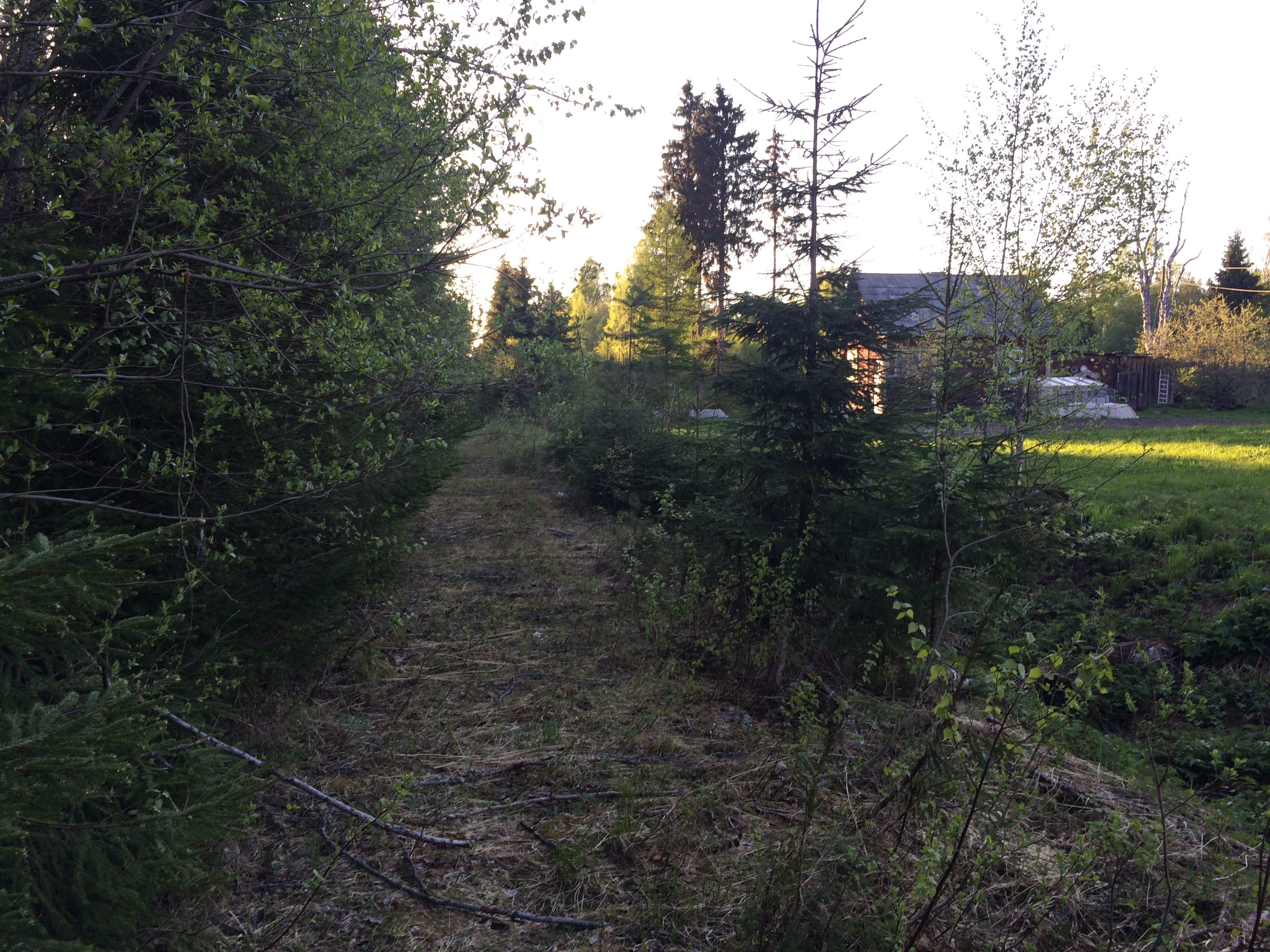 Полотно разобранной железной дороги в посёлке Таустамяки.